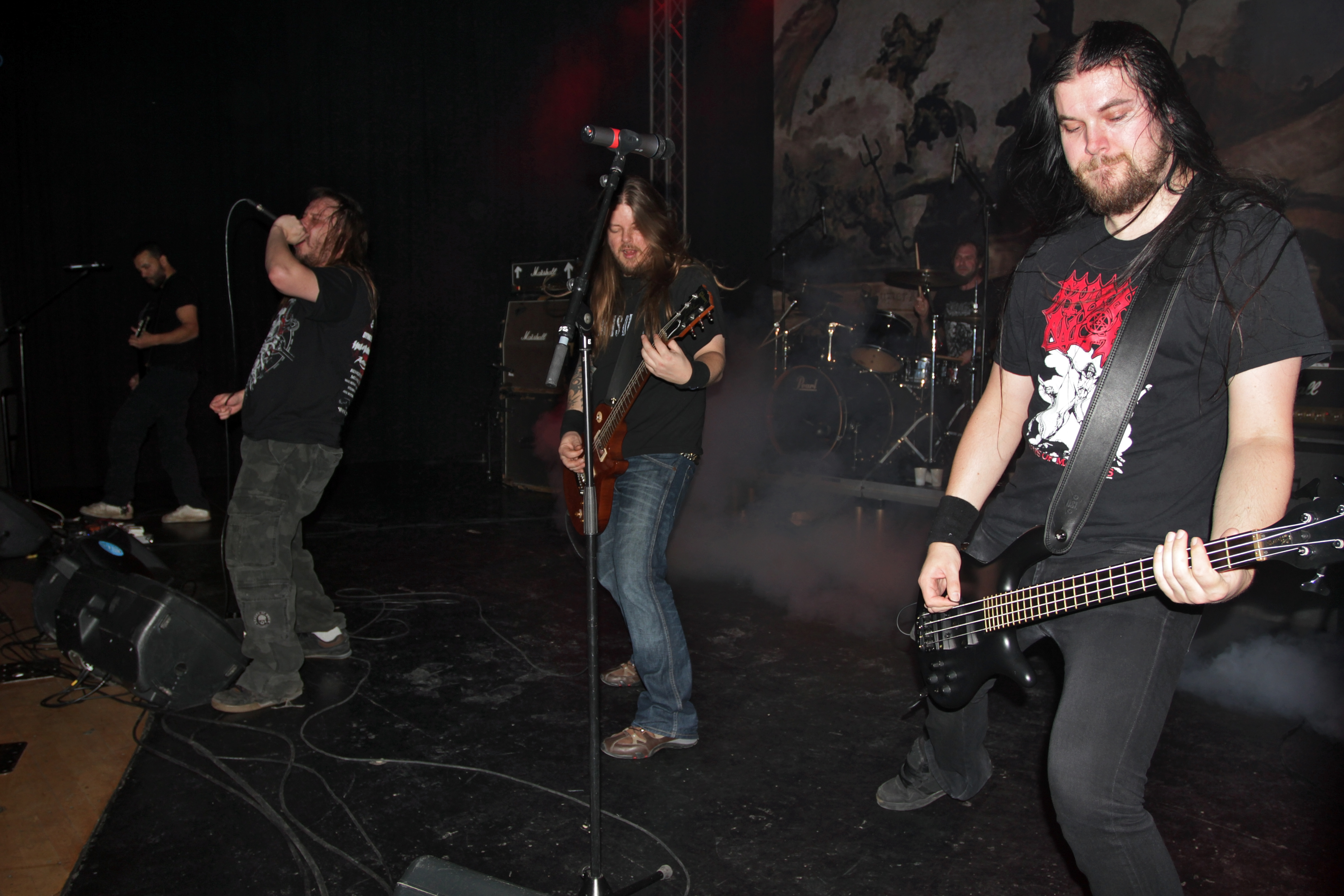 Entombed på Cozmoz, Borlänge, Sverige.